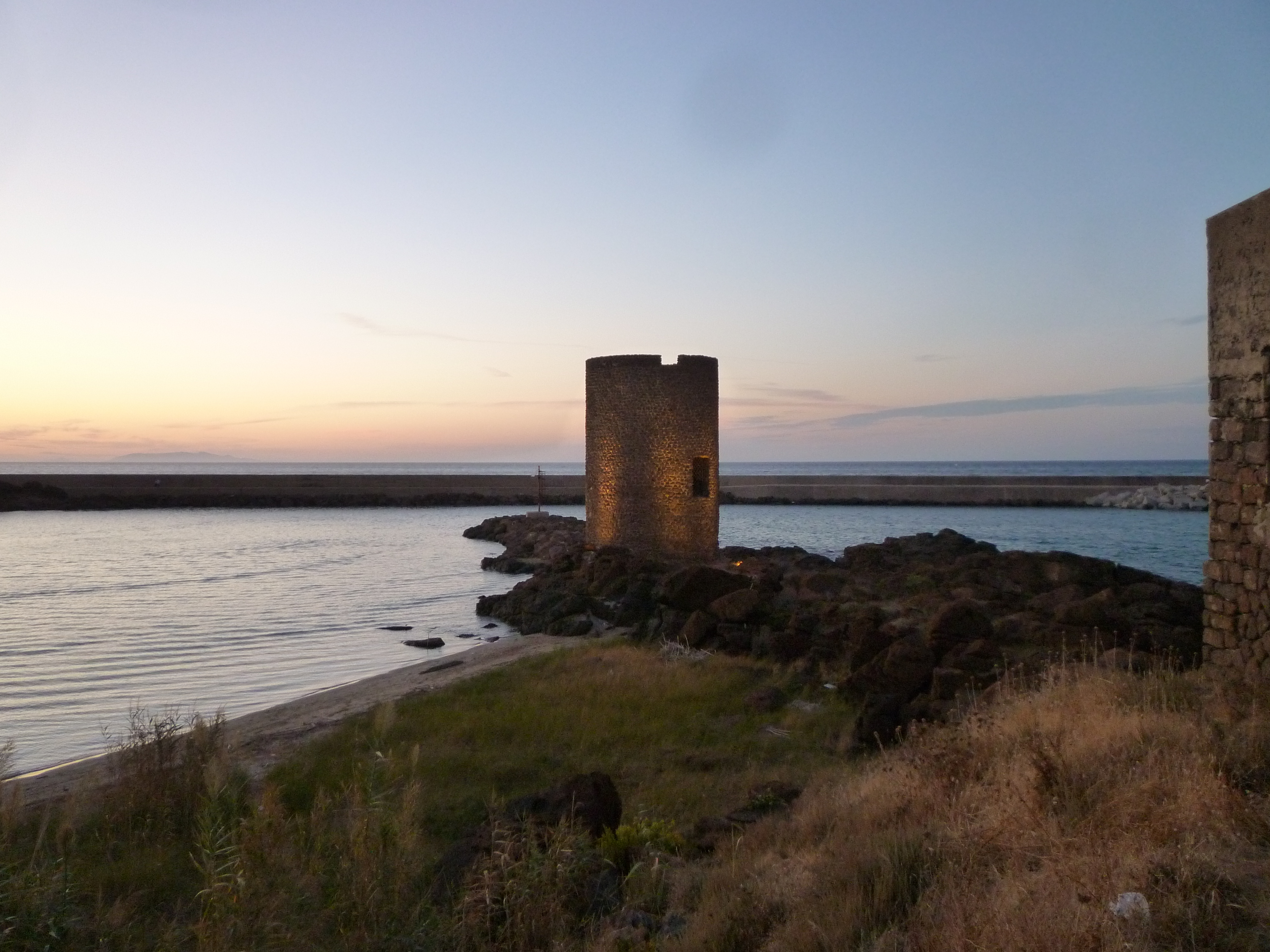 La Torre di Frigiano, Castelsardo (Sassari).JPG